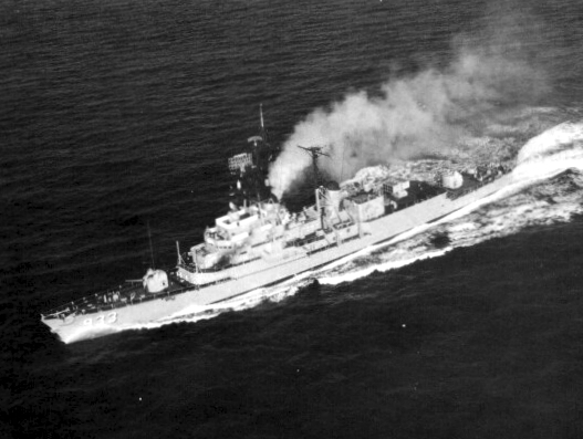 A U.S. Navy destroyer USS Barry (DD-933) underway in 1969.